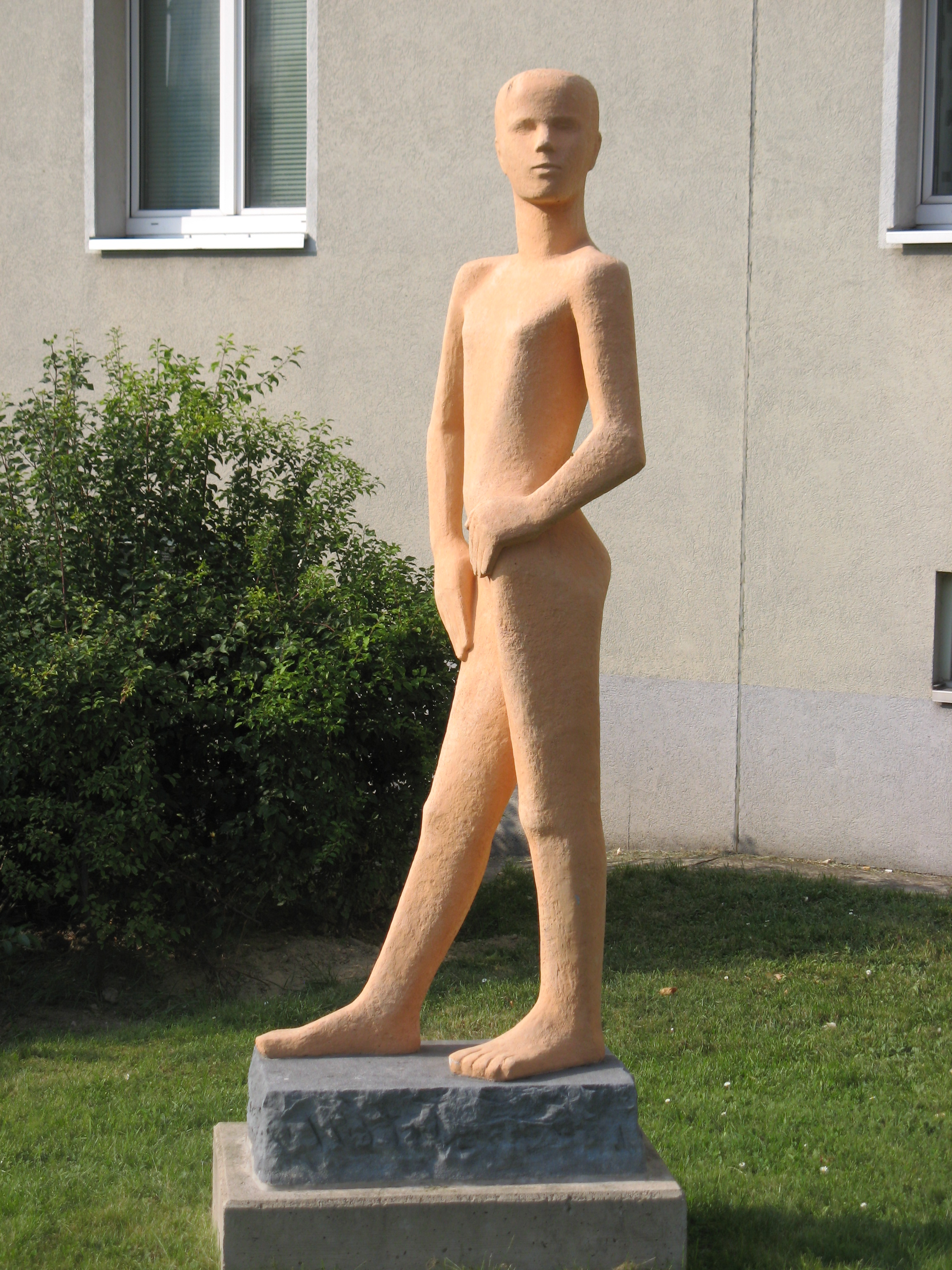 Junges Mädchen (1955) von Hilde Uray (Terrakotta), Klausenburger Straße 32-36, Wien-Favoriten